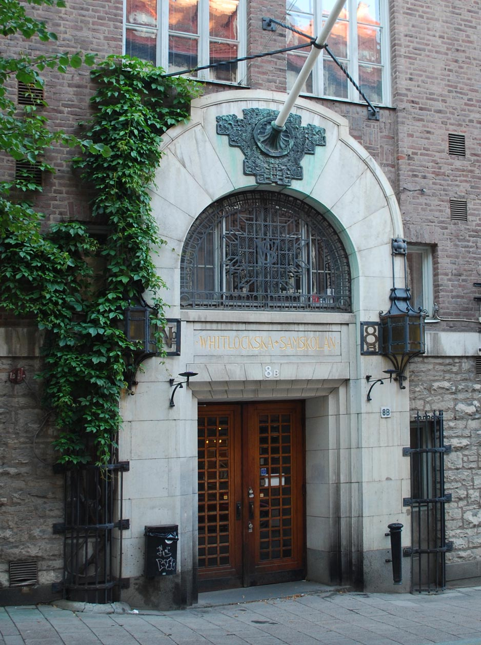 Portal på Whitlockska skolan, Eriksbergsgatan 8A-8B, Stockholm.